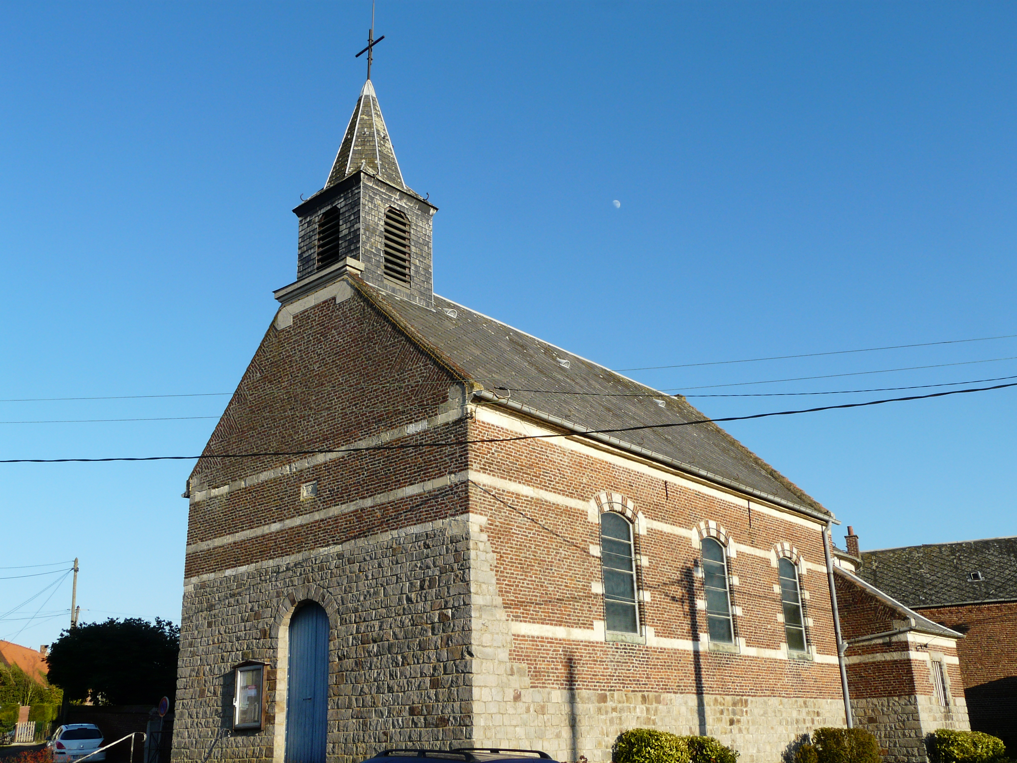 L'église Saint-Nicolas à Sainre-Olle (Raillencourt-Sainte-Olle, Nord)